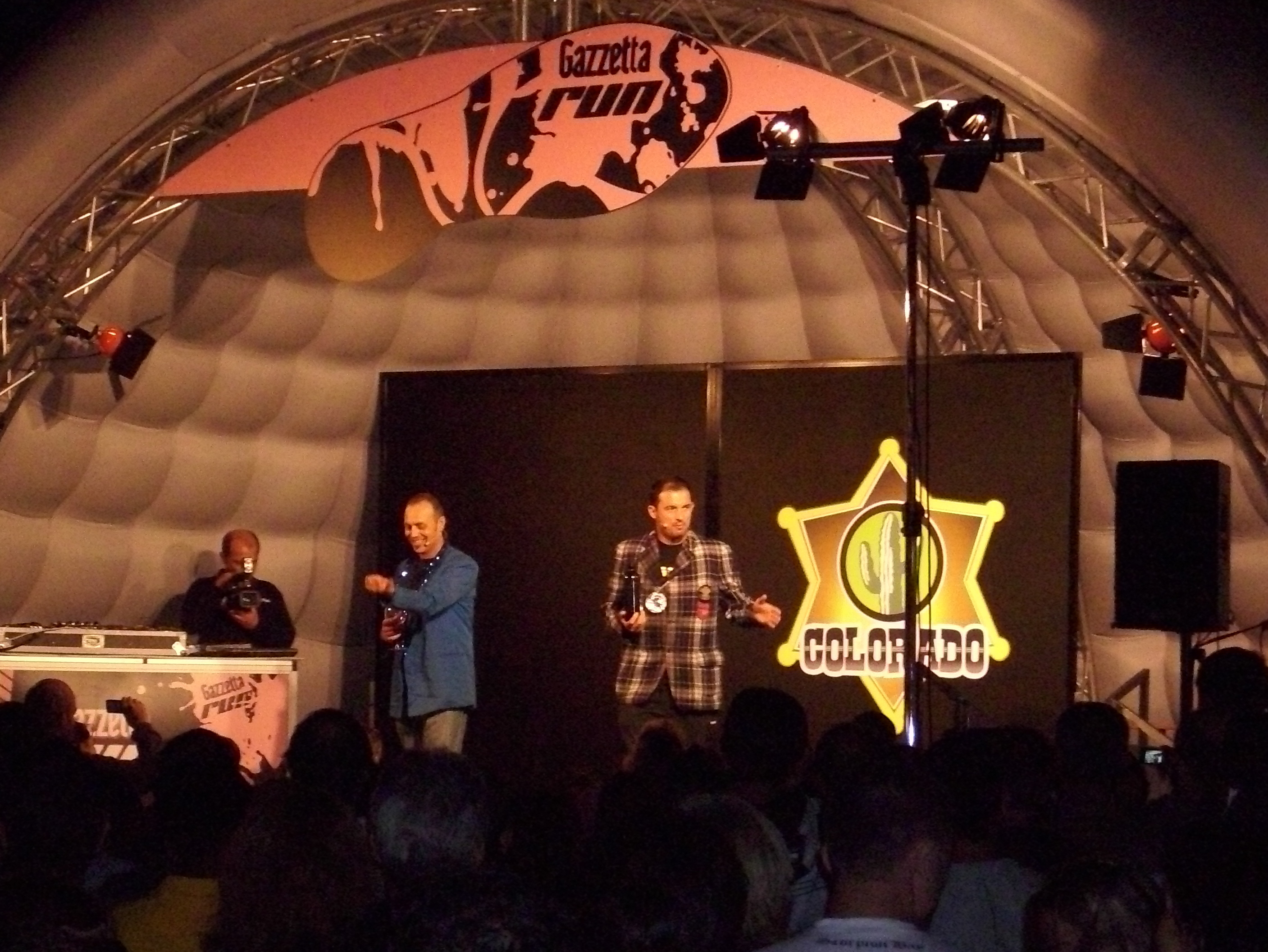 Il gruppo comico dei Turbolenti, in esibizione a Genova nella zona del Porto Antico